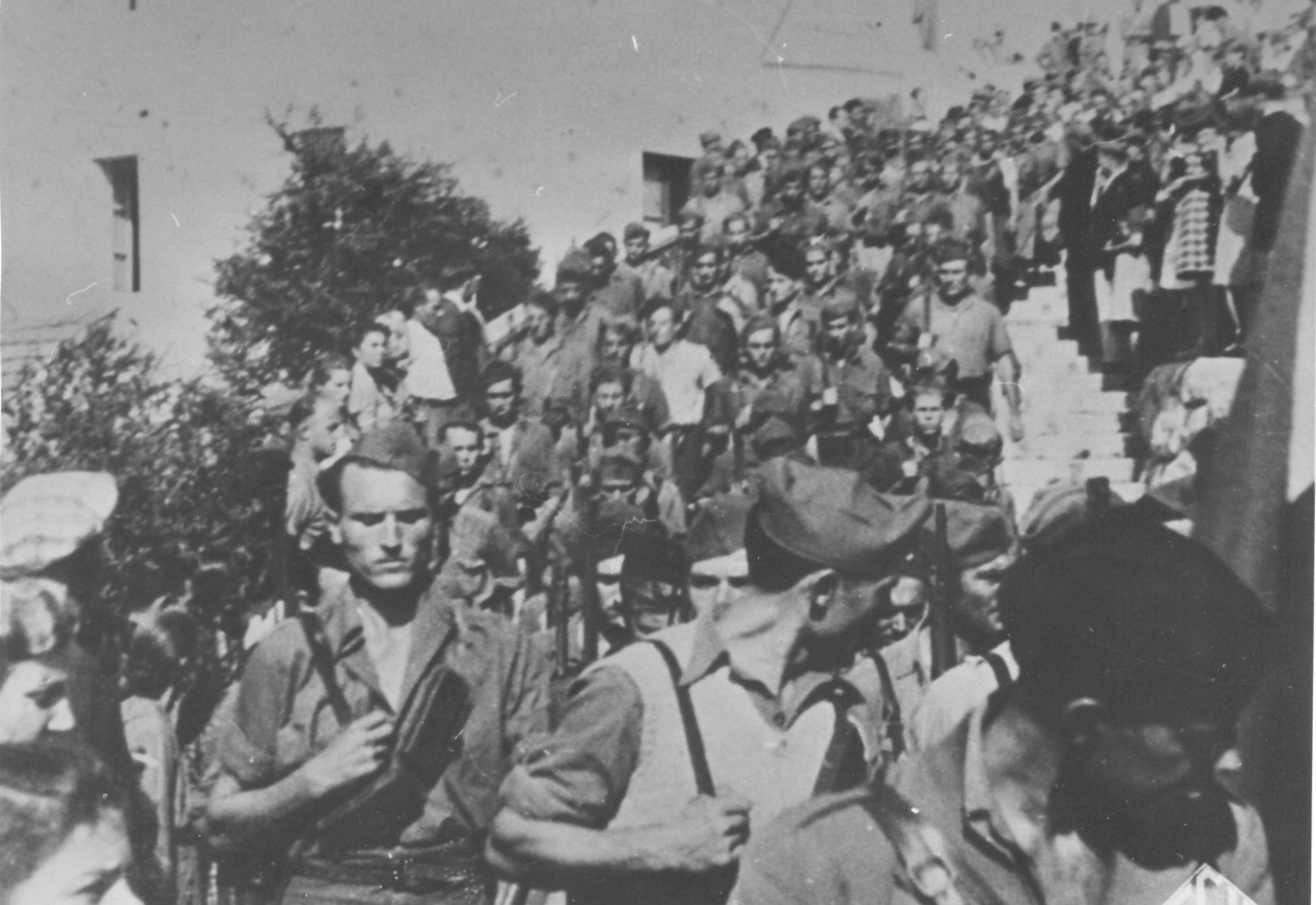 Srpskohrvatski / српскохрватски: Masovni odlazak Splićana u partizane u vreme kapitulacije Italije 1943.